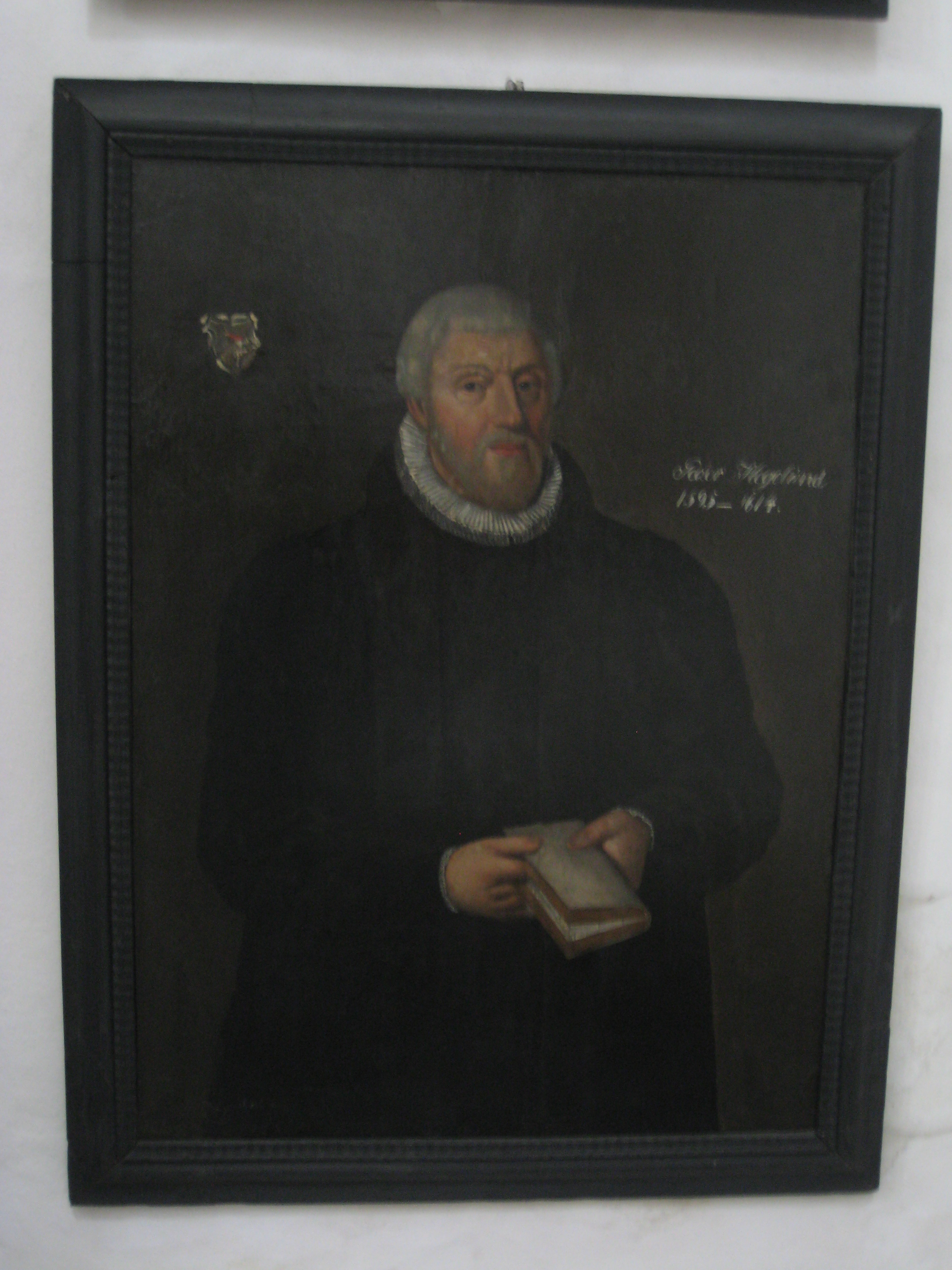 Biskop Peder Jensen Hegelund